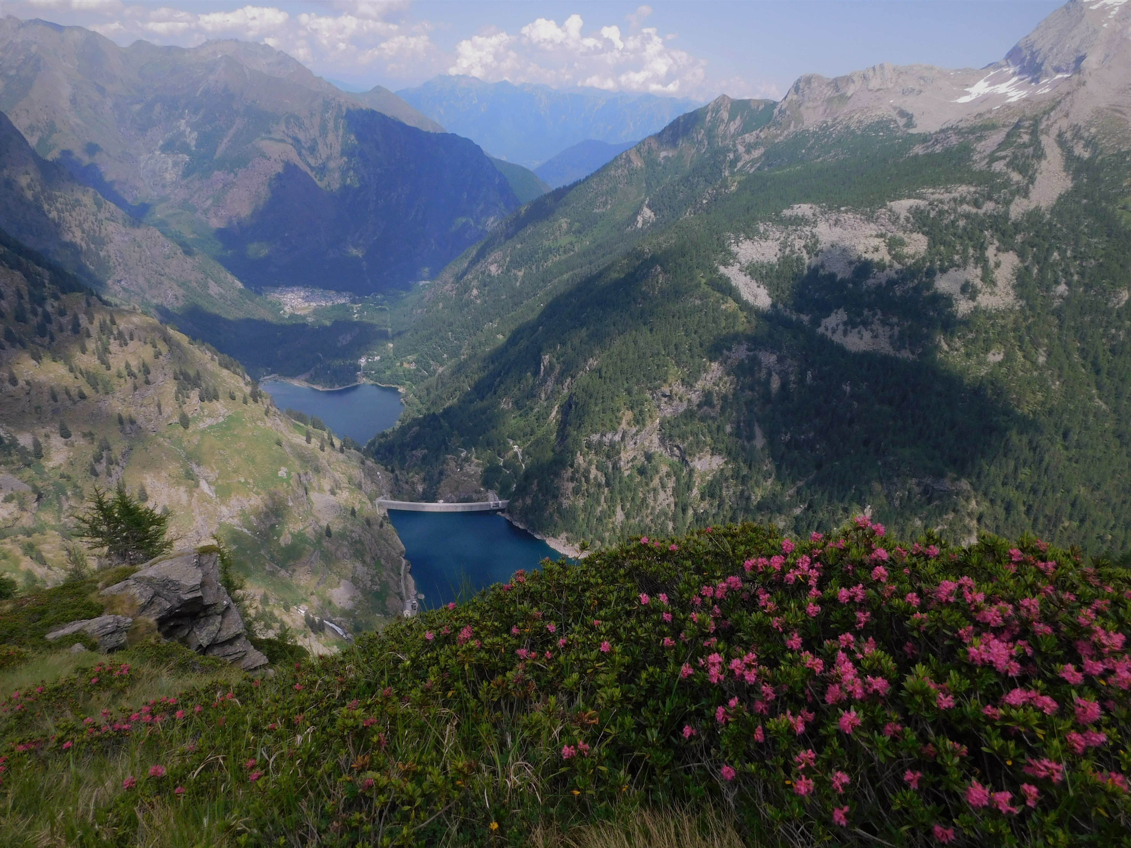 Parco naturale dell'Alta Valle Antrona (Q3895641)